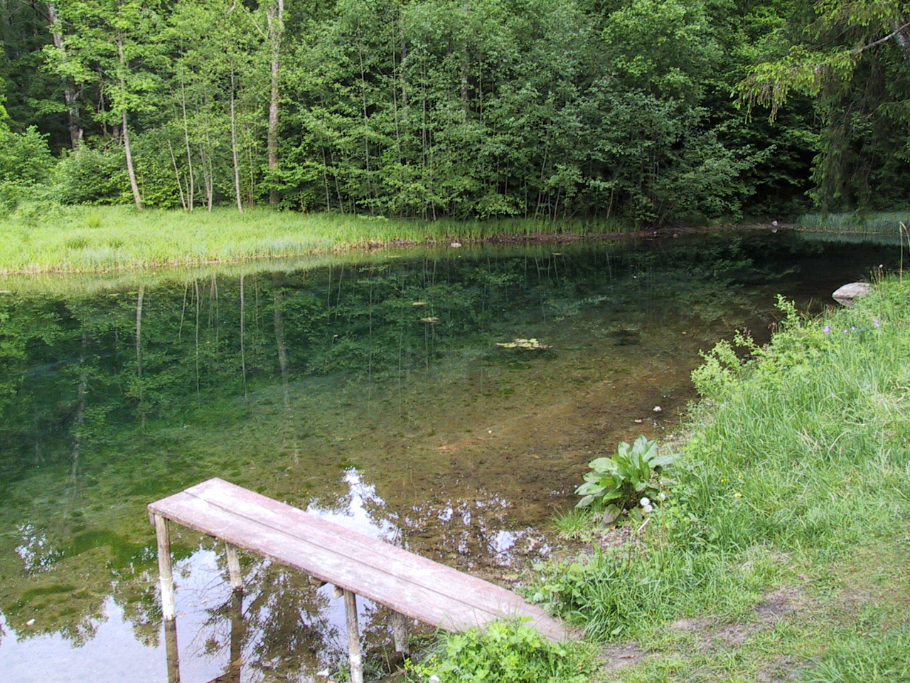 Allazi Mezmuiza springs, Riga district, Latvia, 2 June 2002